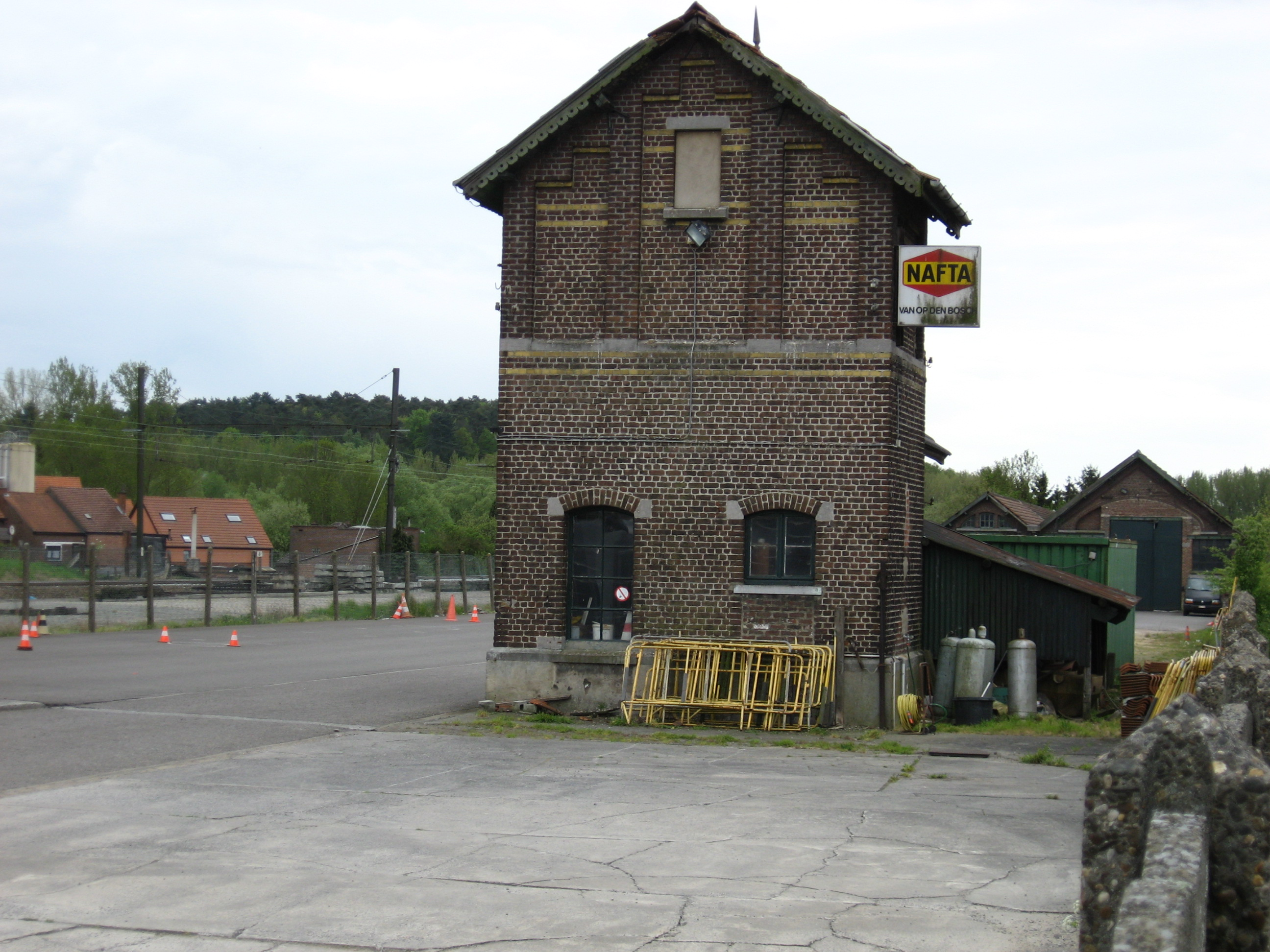 Oude buurtspoorweg watertorengebouw bij het stationsemplacement. Tevens was hier de lampisterie en kolenhok. De ruimte wordt nu gebruikt voor brandstof opslag. Het buurtspoorwegstation was gelegen naast het spoorstation.